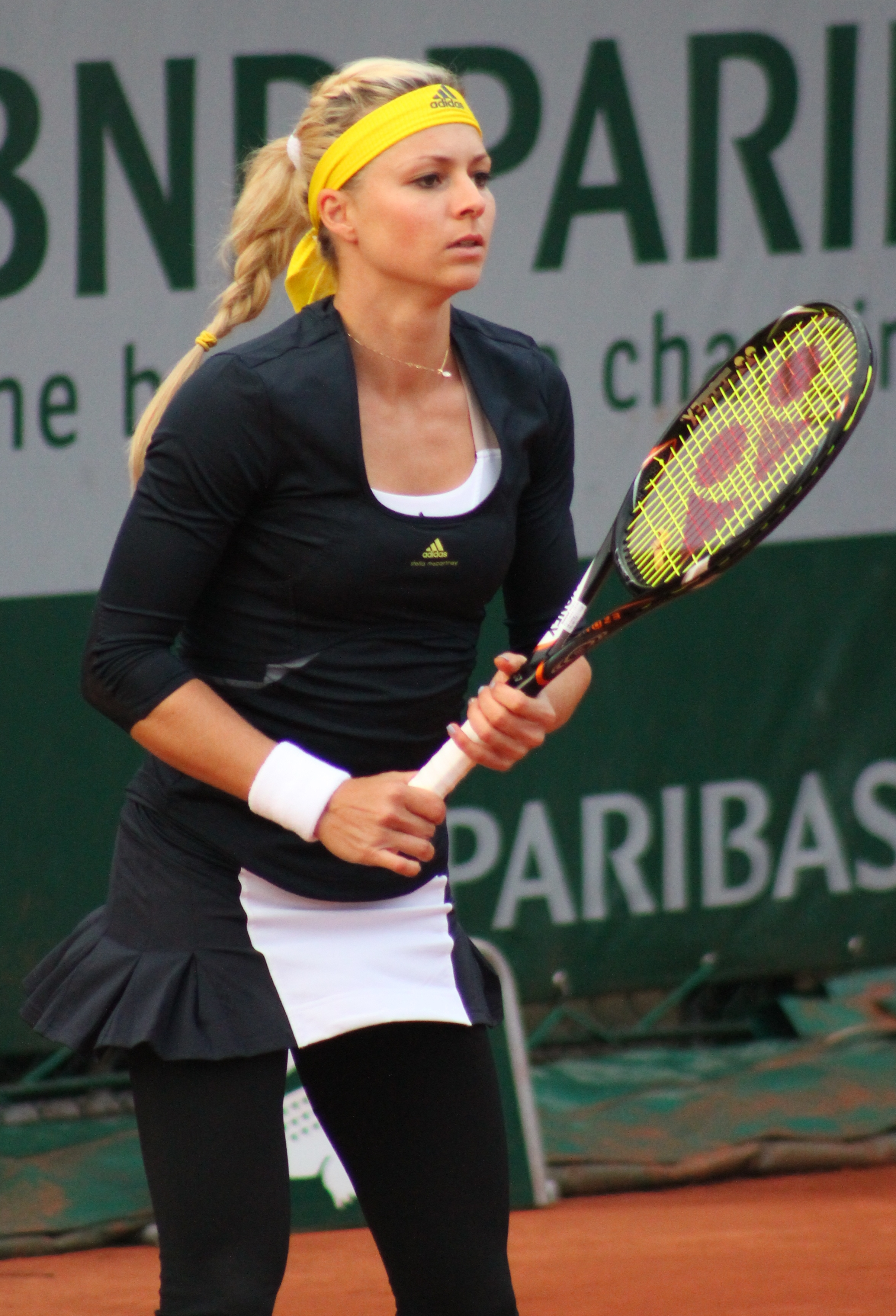 Kirilenko RG13 (26)